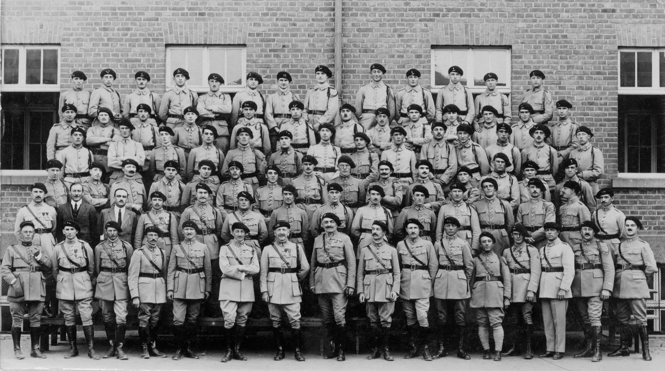 97° R.I. 1926 Ludwigshafen